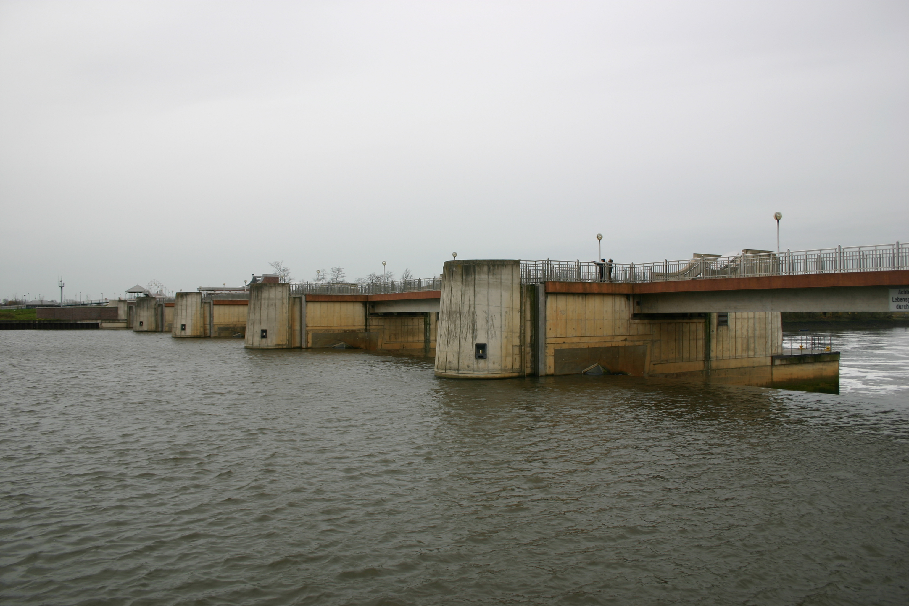 Weserwehr Bremen, from upstream